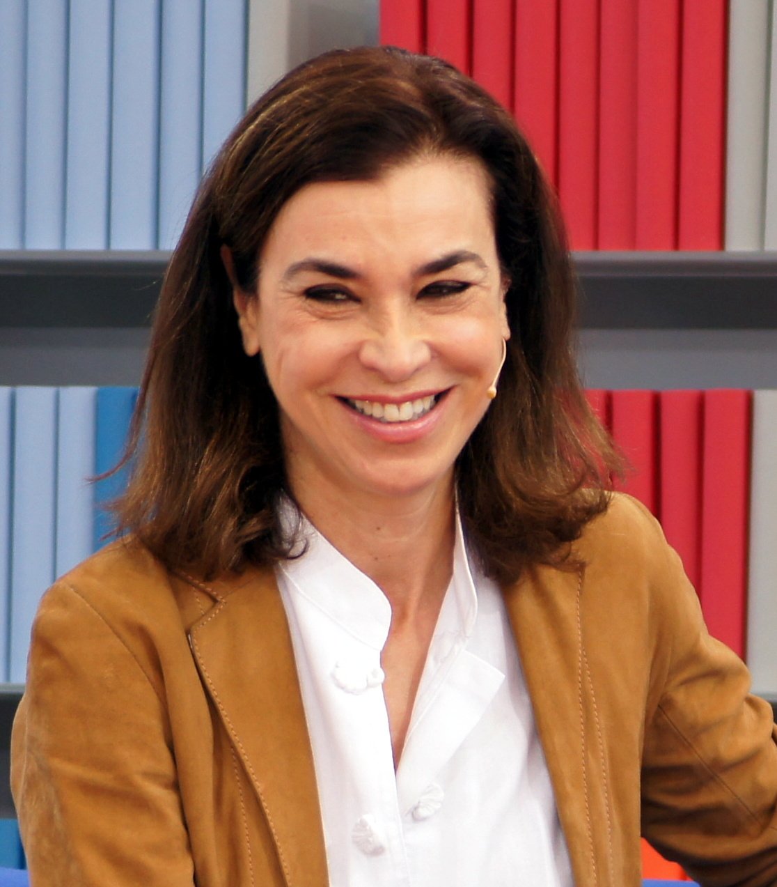 Dieses Fotos dürfen Sie honorarfrei nutzen, wenn Sie folgenden credit beachten: Copyright: Das blaue Sofa / Club Bertelsmann. Posadas, Carmen: Bei Einladung Mord, Edition zeilenreich, Club Bertelsmann, Moderation: Carl-Ludwig Paeschke. Wie organisiert man seine eigene Ermordung? Herrlich amüsanter Krimi in bester Agatha-Christie-Tradition. Finanziell ruiniert, geschieden, schwerkrank überlegt Olivia, wie sie ihr einst so perfektes Leben auf möglichst glamouröse Weise beenden kann. Sie entschließt sich, ihre ärgsten Feinde auf eine private Luxusyacht einzuladen - und ihr Plan geht auf: Bei einem Sturz muss die 43-jährige ihr Luxusleben endgültig hinter sich lassen. Aber war Olivias Tod nun ein Unfall, Selbstmord oder wurde sie gar ermordet? Zumindest hätten alle an Bord ein Motiv für die Tat. Carmen Posadas, 1953 in Montevideo geboren, ist in London, Buenos Aires und Moskau aufgewachsen. Ihre literarische Karriere begann sie 1980 mit dem Verfassen von Kinderbüchern. 1996 veröffentlichte sie ihren ersten Roman, Fünf blaue Fliegen. Mit ihrem zweiten Roman, Kleine Infamien, gewann sie 1998 den Premio Planeta, der ihr zum internationalen Durchbruch verhalf. Carmen Posadas lebt in Madrid.